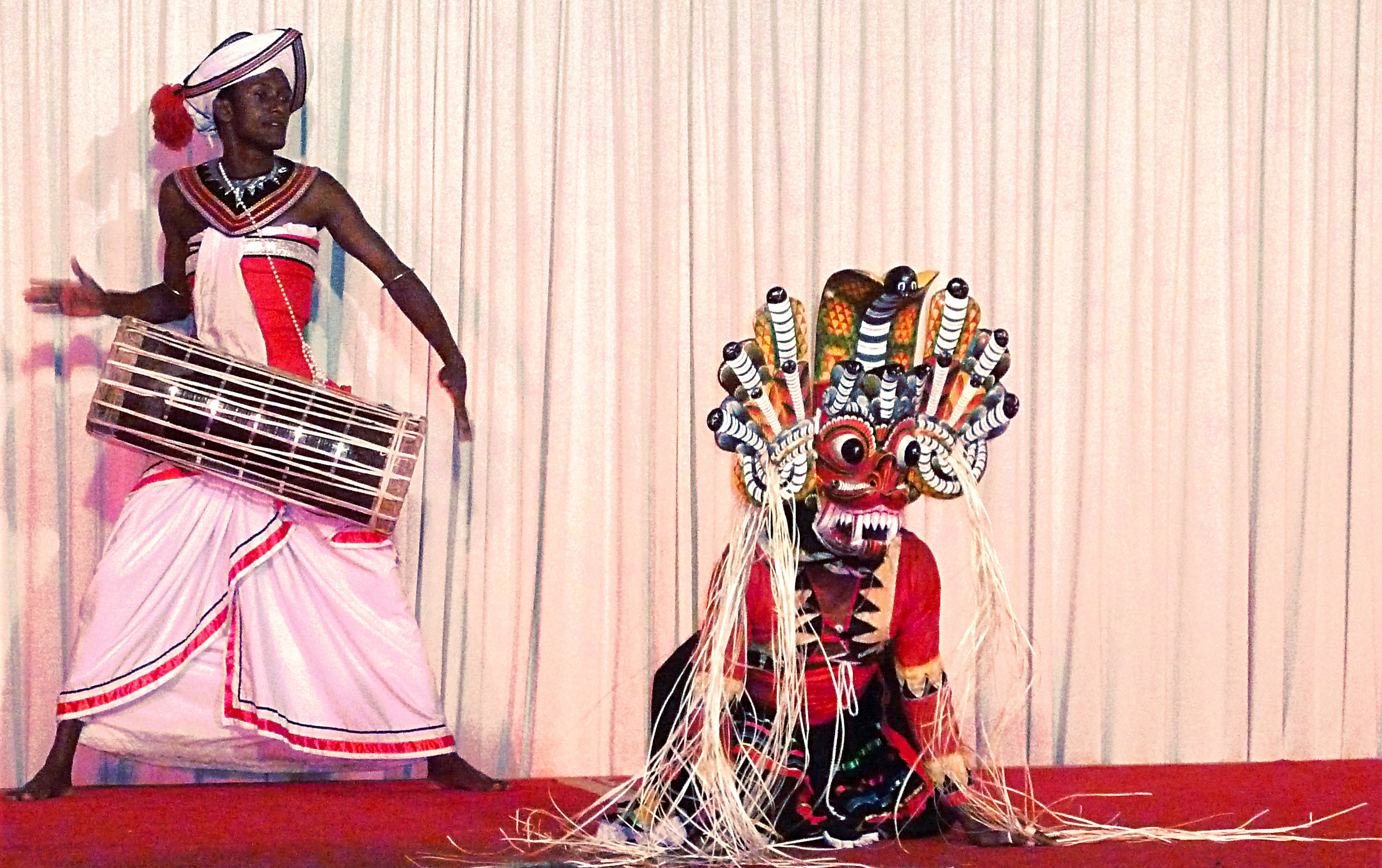 Oak- Ray Kadyan Dance à Kandy Sri Lanka.- Asie du Sud